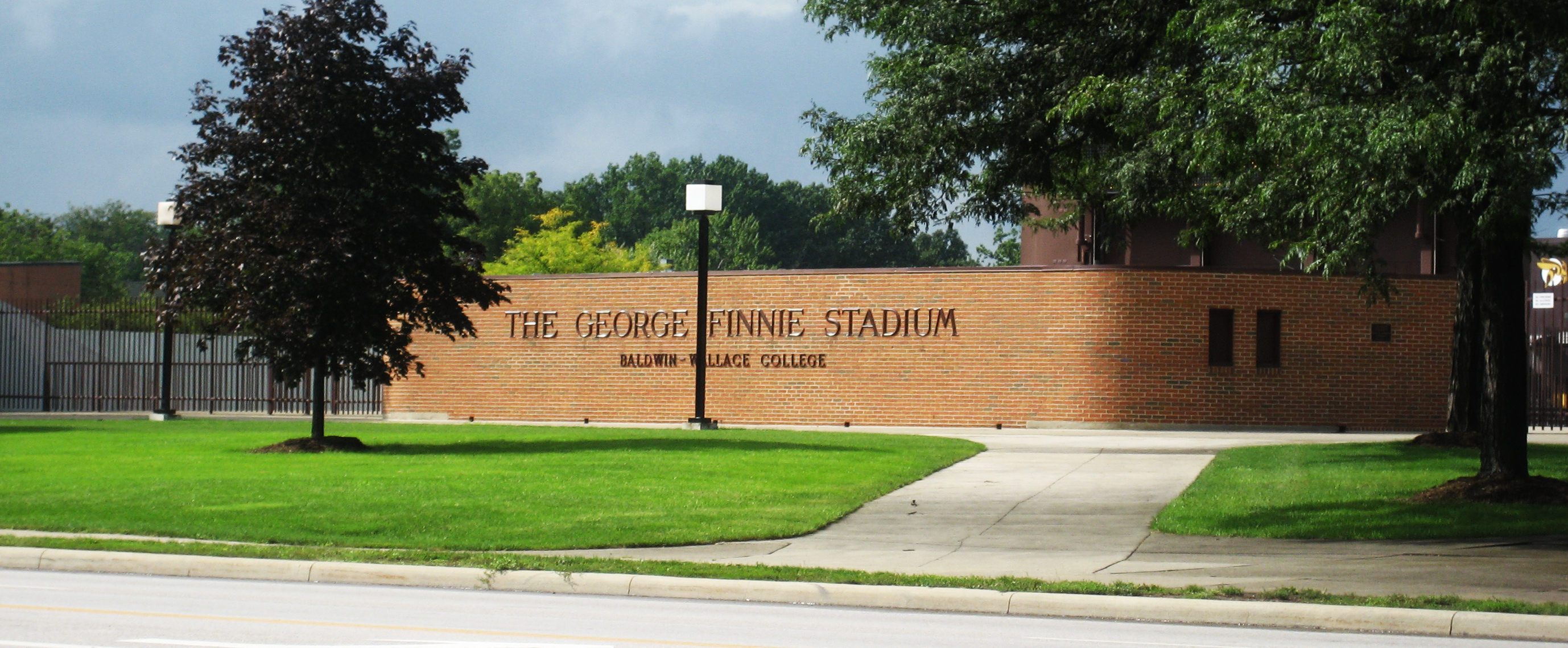 Finnie Stadium at Baldwin-Wallace College